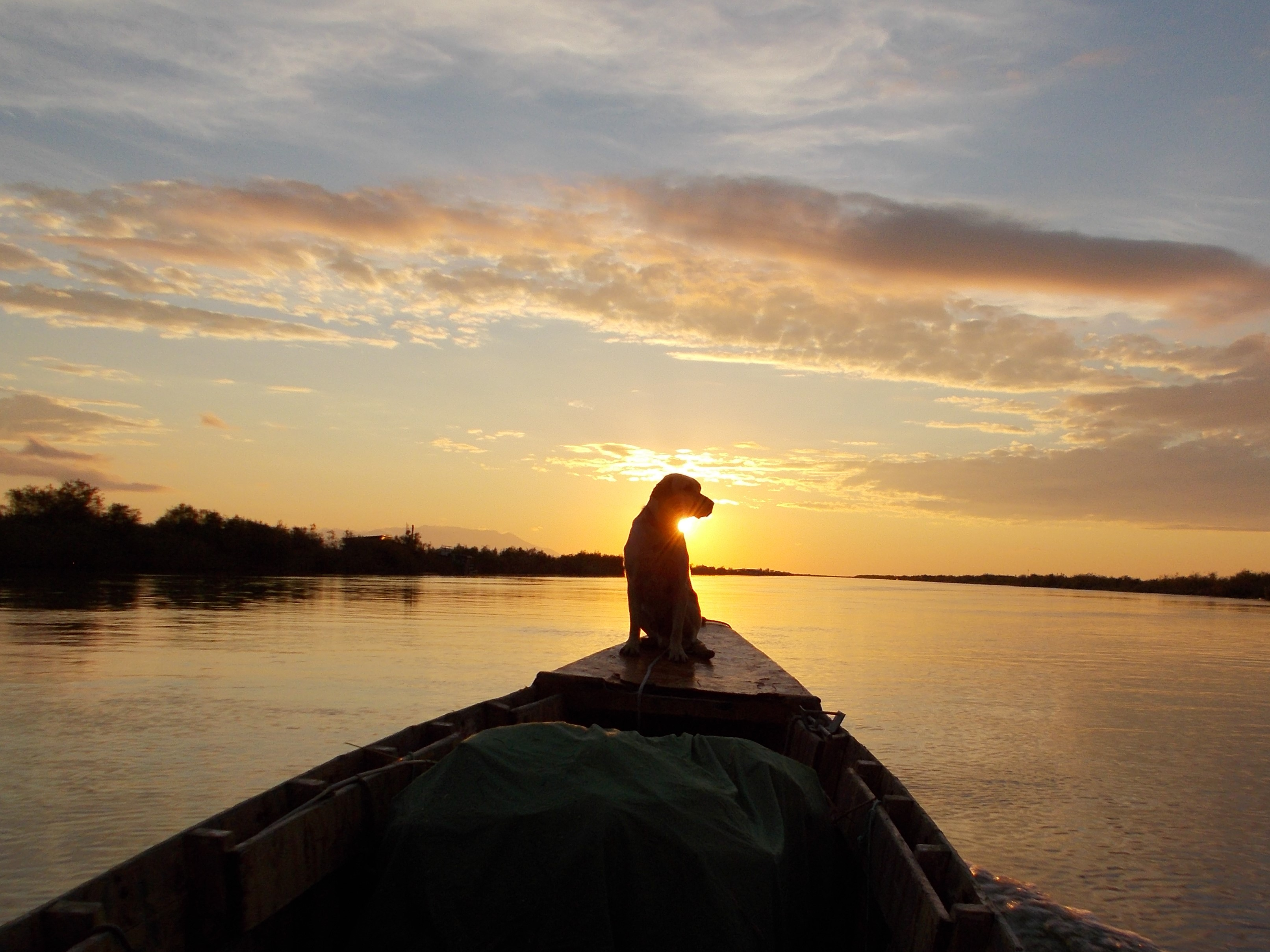 Δέλτα του Έβρου This is a photography of Natura 2000 protected area with ID GR1110006